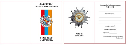 Պատվոշ քանշանի վկայական